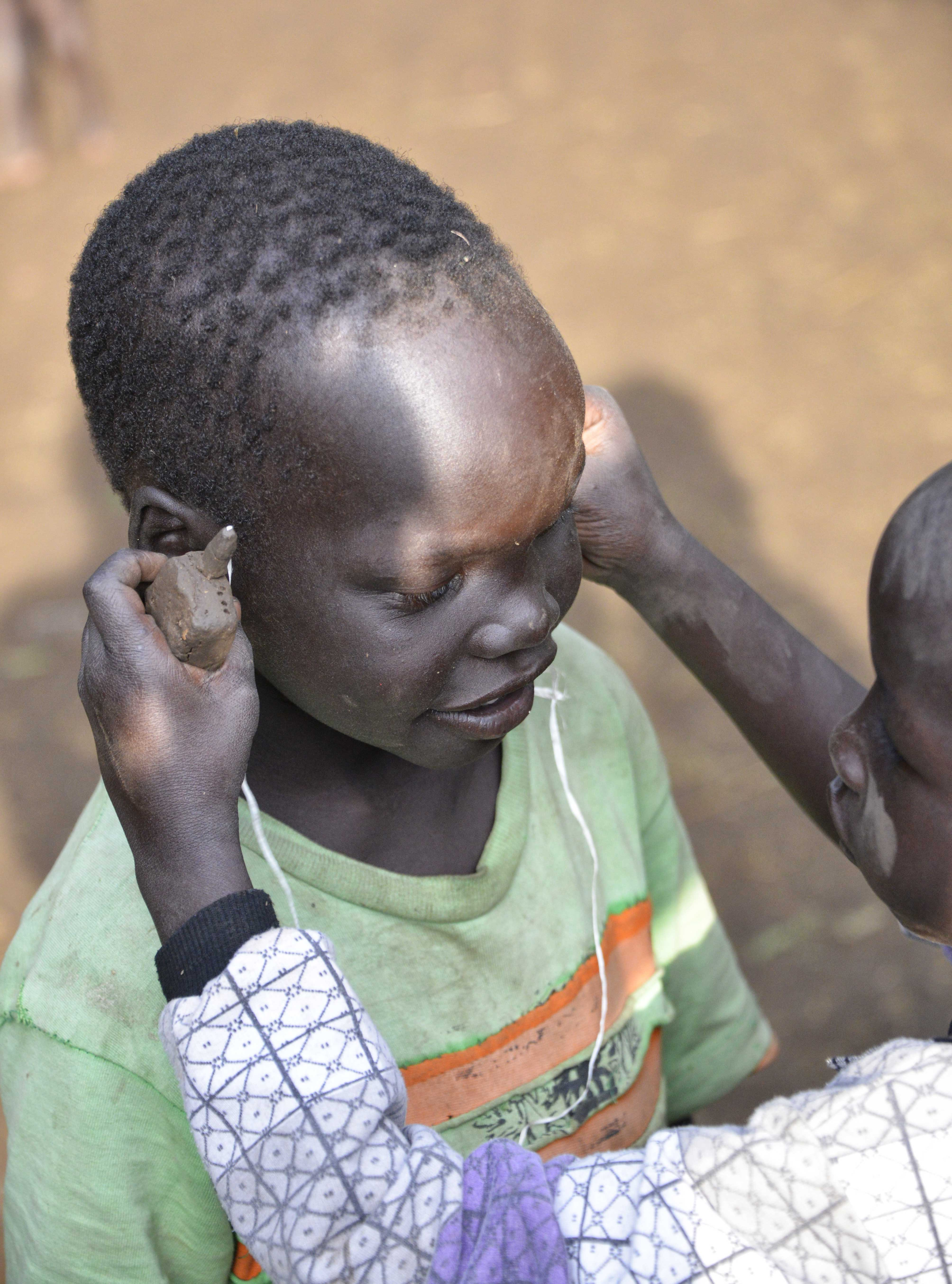 Ethiopia